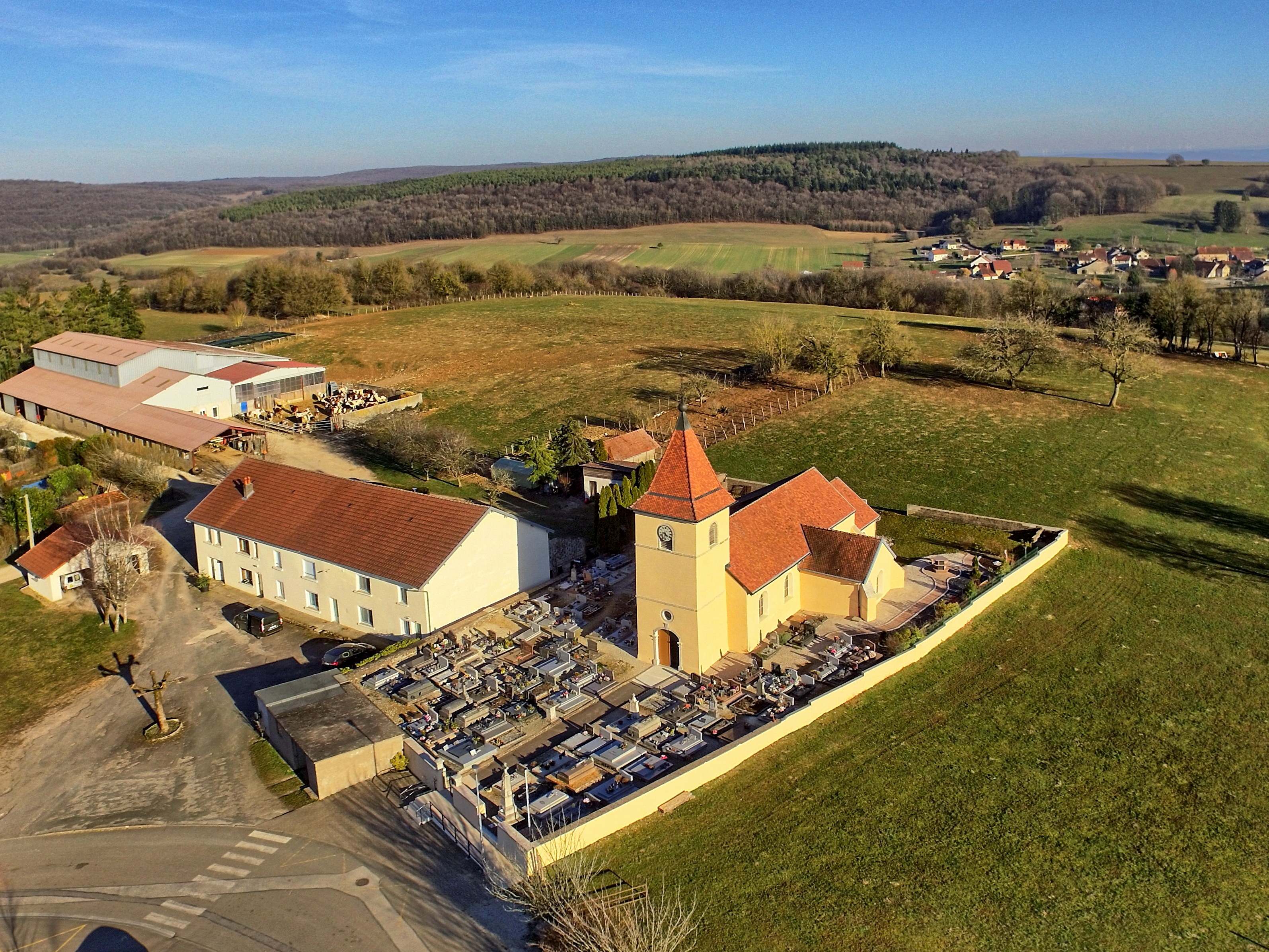 L'église de Recologne-lès-Rioz